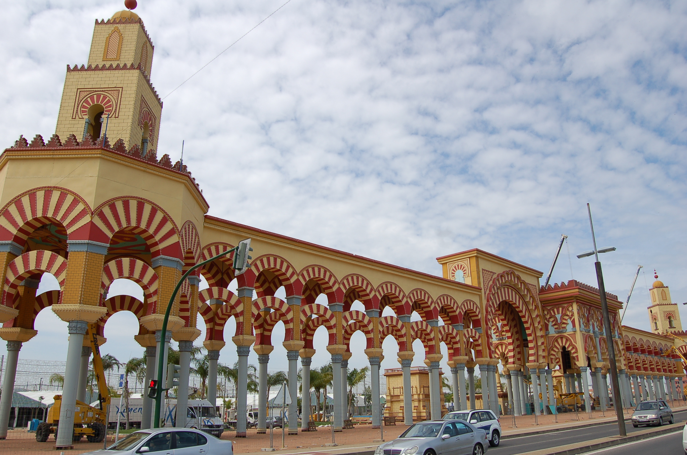 Portada de la Feria de Córdoba (España).